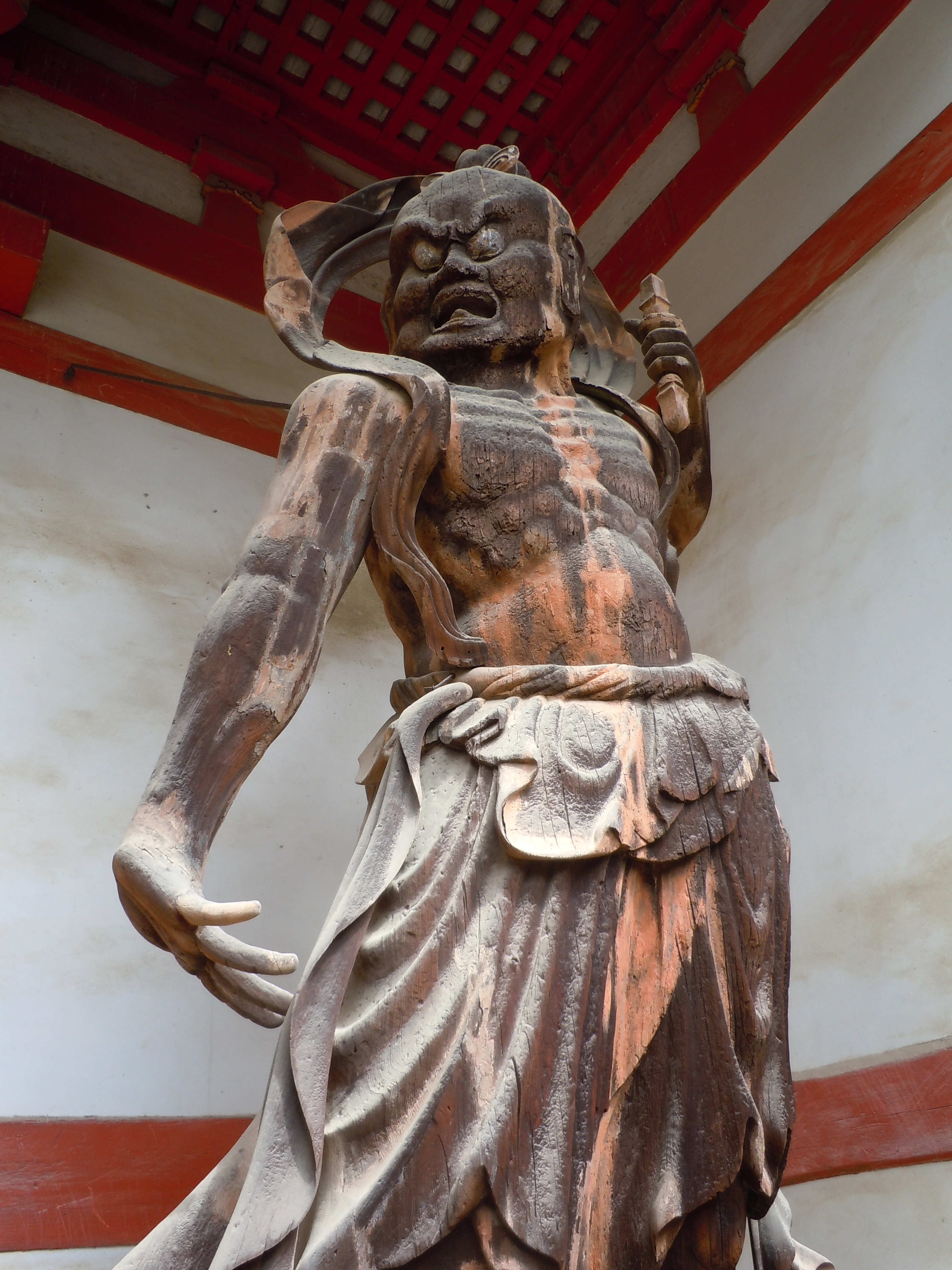 京都市伏見区の醍醐寺仁王門の仁王（阿）。